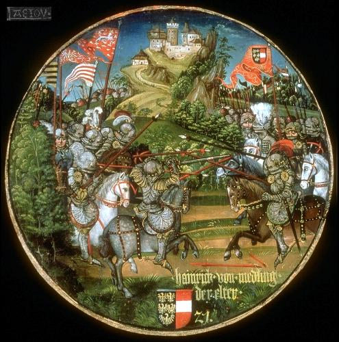 Herzog Heinrich der Ältere von Mödling (1158-1223), ein Sohn Herzog Heinrichs II. (Babenberger Stammbaum, Stift Klosterneuburg)